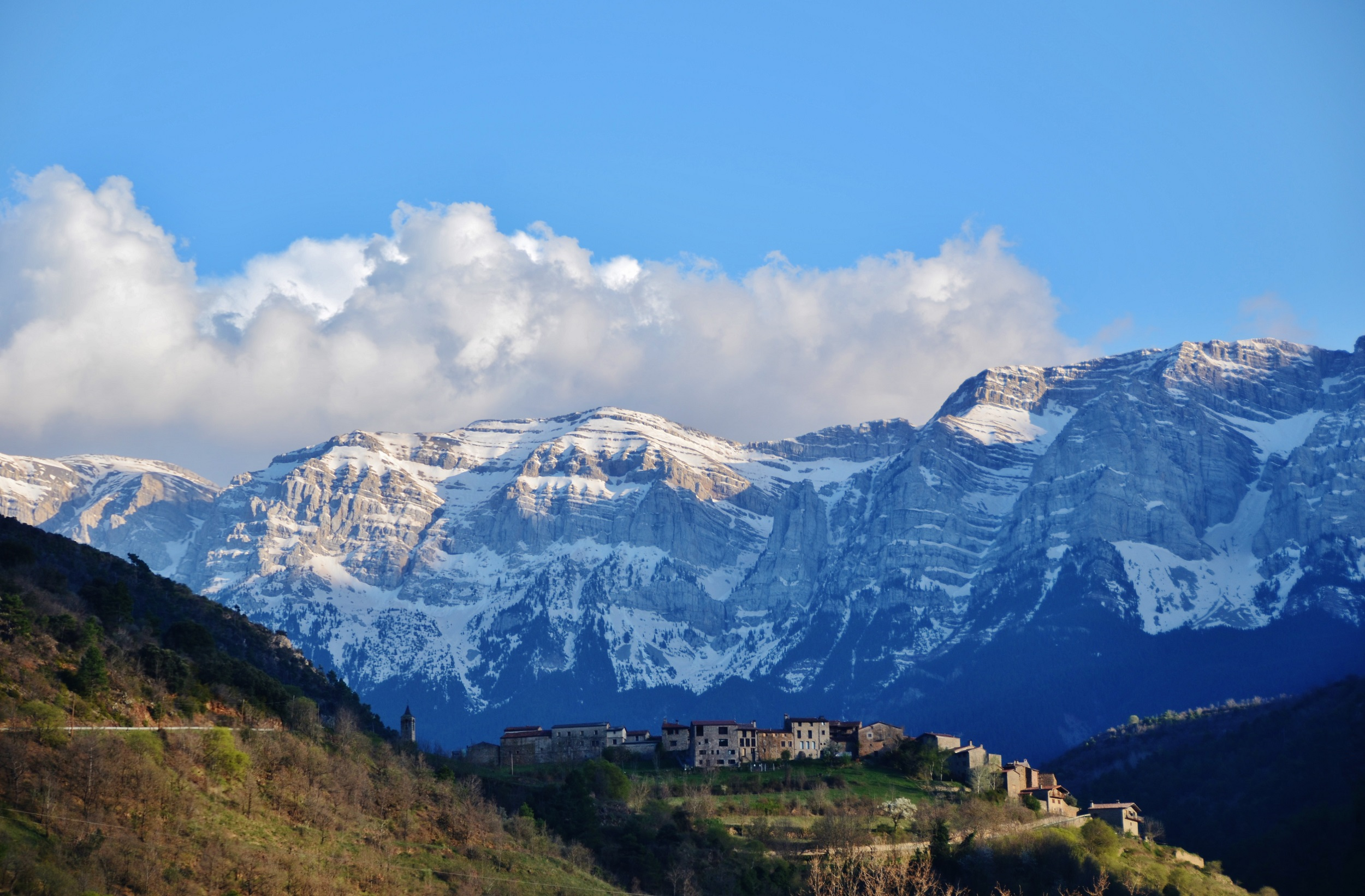 Parc Natural Cadí Moixeró This is a a photo of a natural area in Catalonia, Spain, with id: ES510202